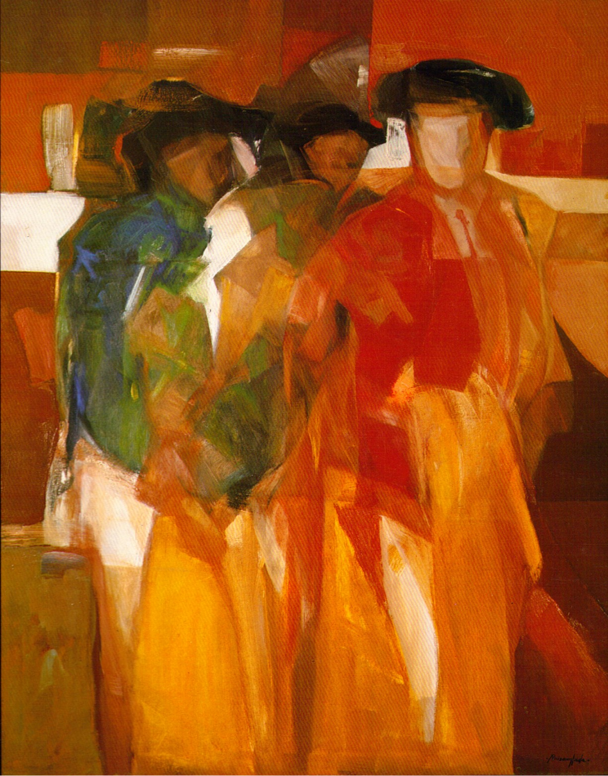 Ruizanglada Toreros 114x146 Oleo sobre lienzo.